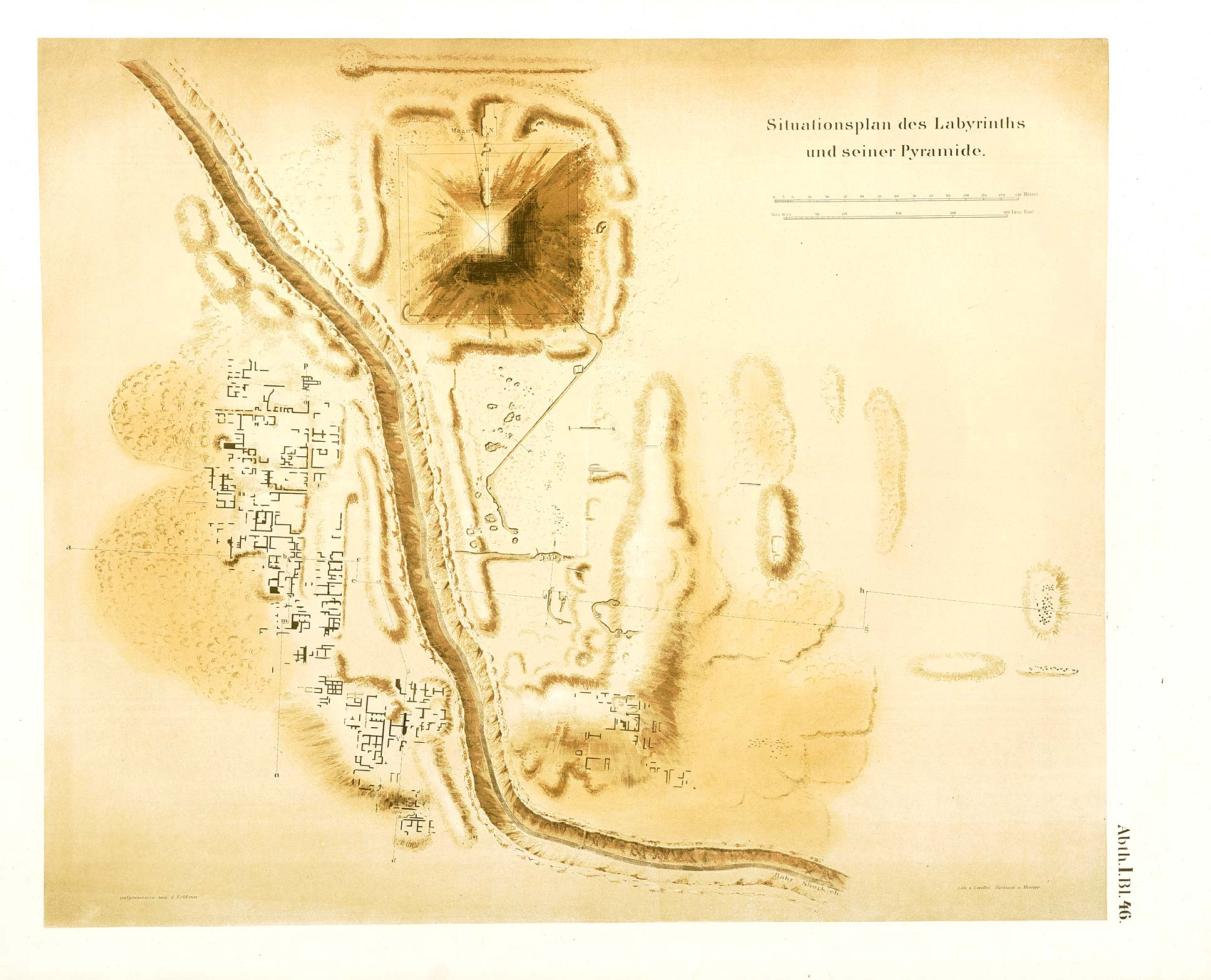 Denkmaeler aus Aegypten und Aethiopien nach den Zeichnungen der von Seiner Majestät dem Koenige von Preussen, Friedrich Wilhelm IV., nach diesen Ländern gesendeten, und in den Jahren 1842–1845 ausgeführten wissenschaftlichen Expedition auf Befehl Seiner Majestät